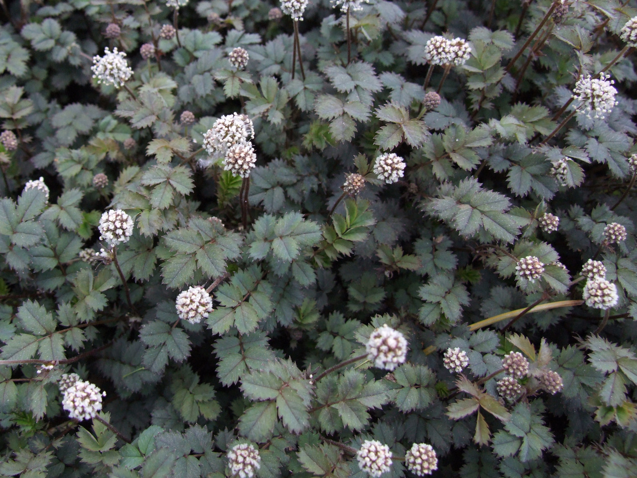 Acaena caesiiglauca